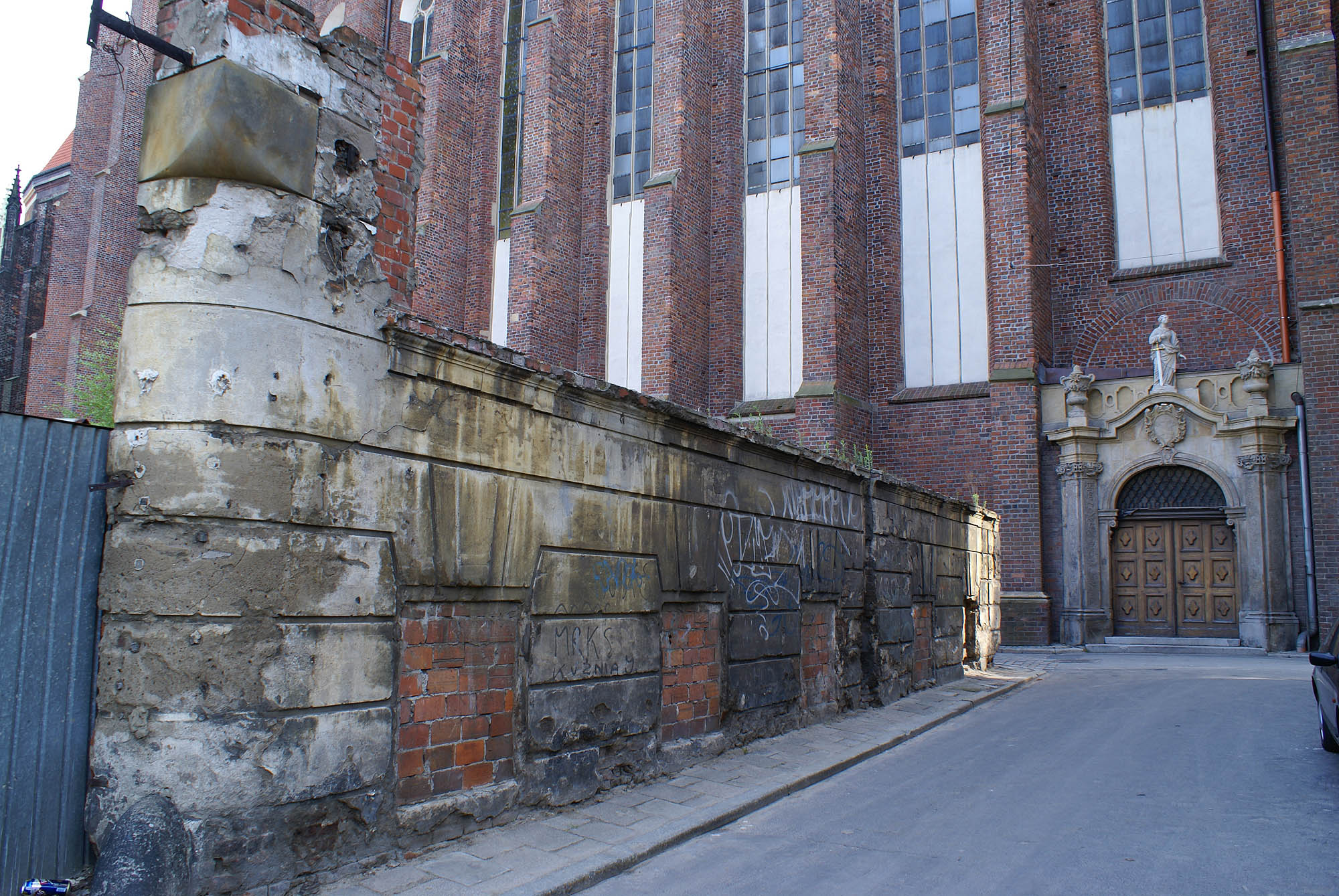 Wrocław, kościół klasztorny augustianów eremitów, ob. par. p.w. śś. Wacława, Doroty i Stani…, 1351-1381, ok. 1400, 3 ćw. XV, 1720-1730, 1892-1899, 1927-1936